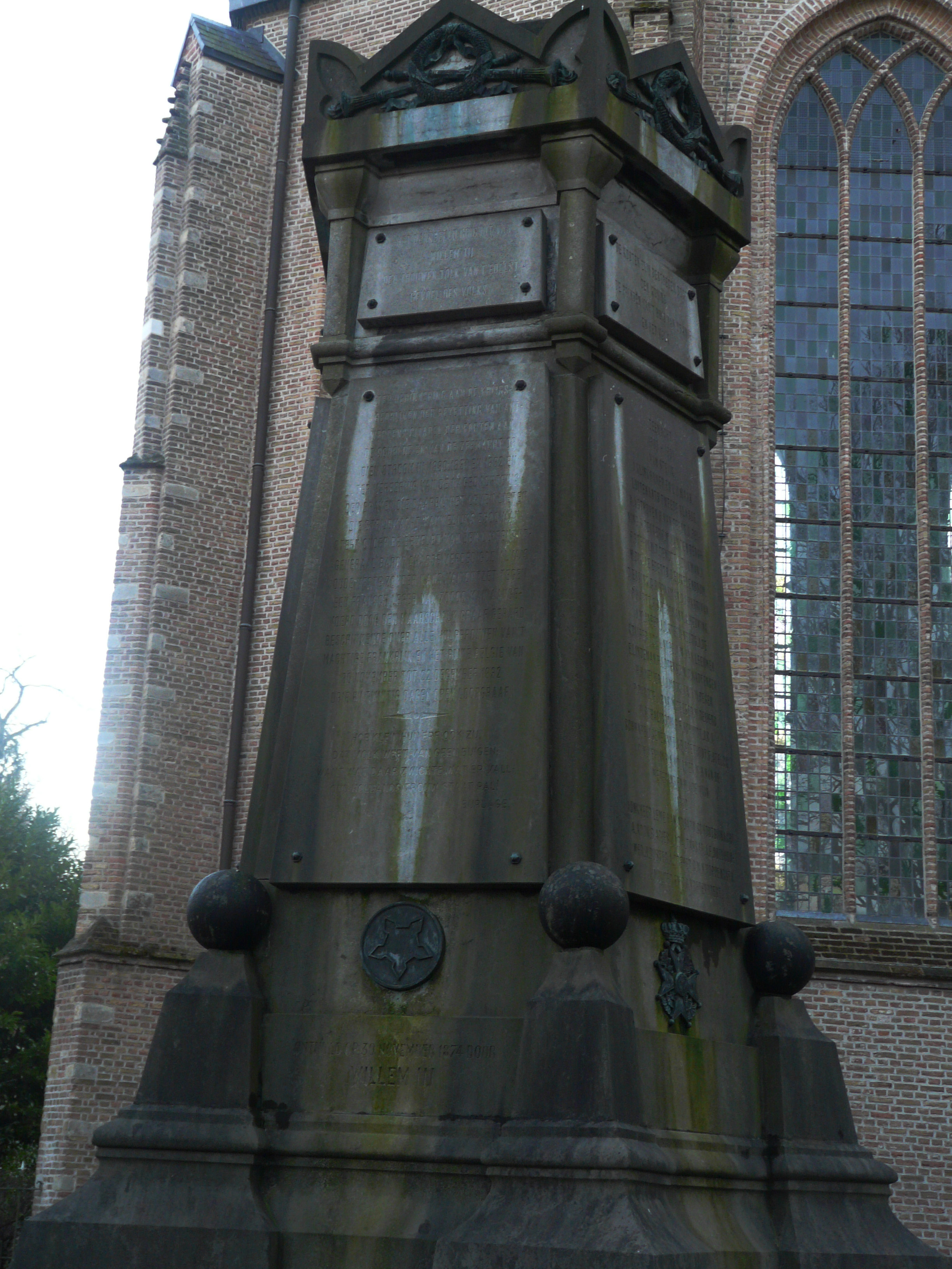 Detail Hervormde kerk in het Ginneken in Breda